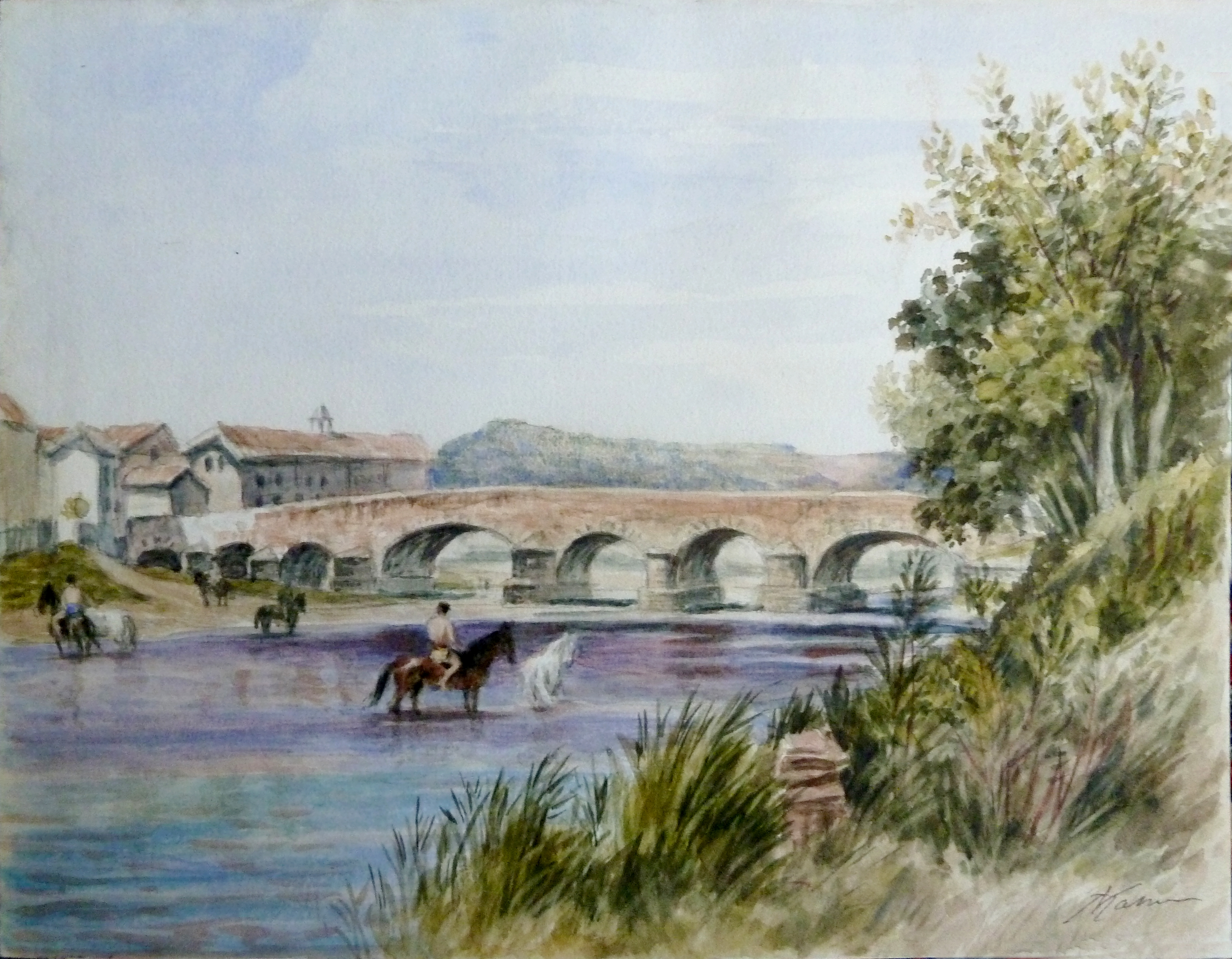 Aquarelle de Victor Masson représentant le Pont de Malzéville à la fin du XIXe siècle.